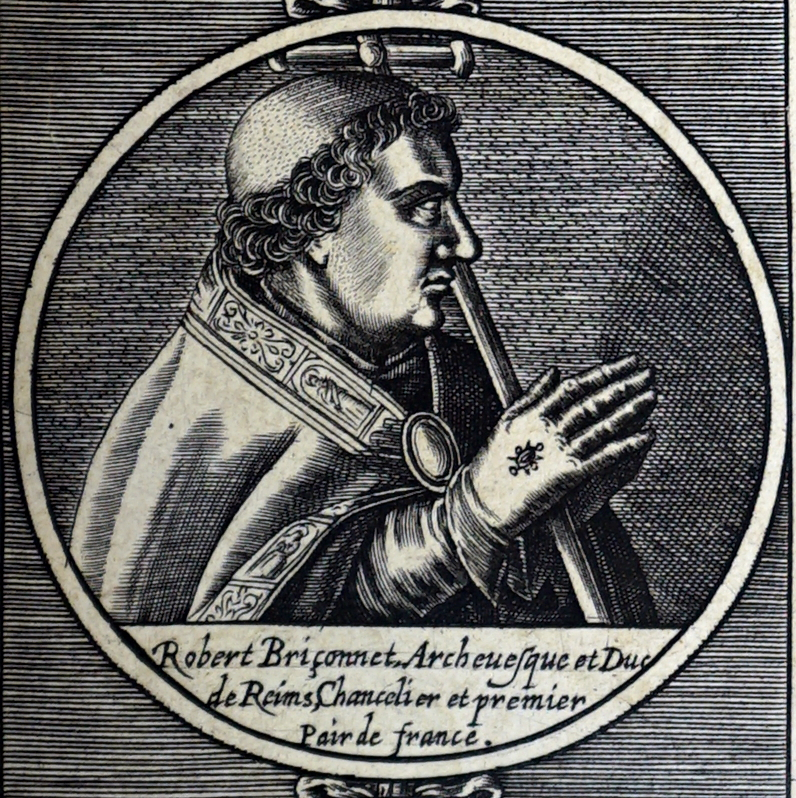 image du livre de Guy Bretonneau.